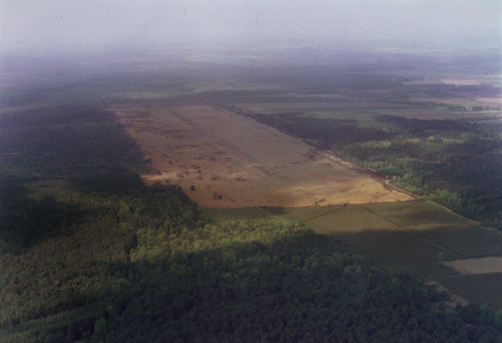 Seit 1991 aufgegebener Bombenabwurf- und Feldlandeplatz der Gruppe der Sowjetischen Streitkräfte in Deutschland in der Retzower Heide, Blickrichtung West